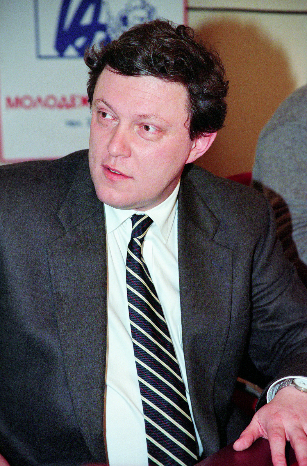 Григорий Алексеевич Явлинский выступил на встрече с переславцами в культурном центре «Славич».